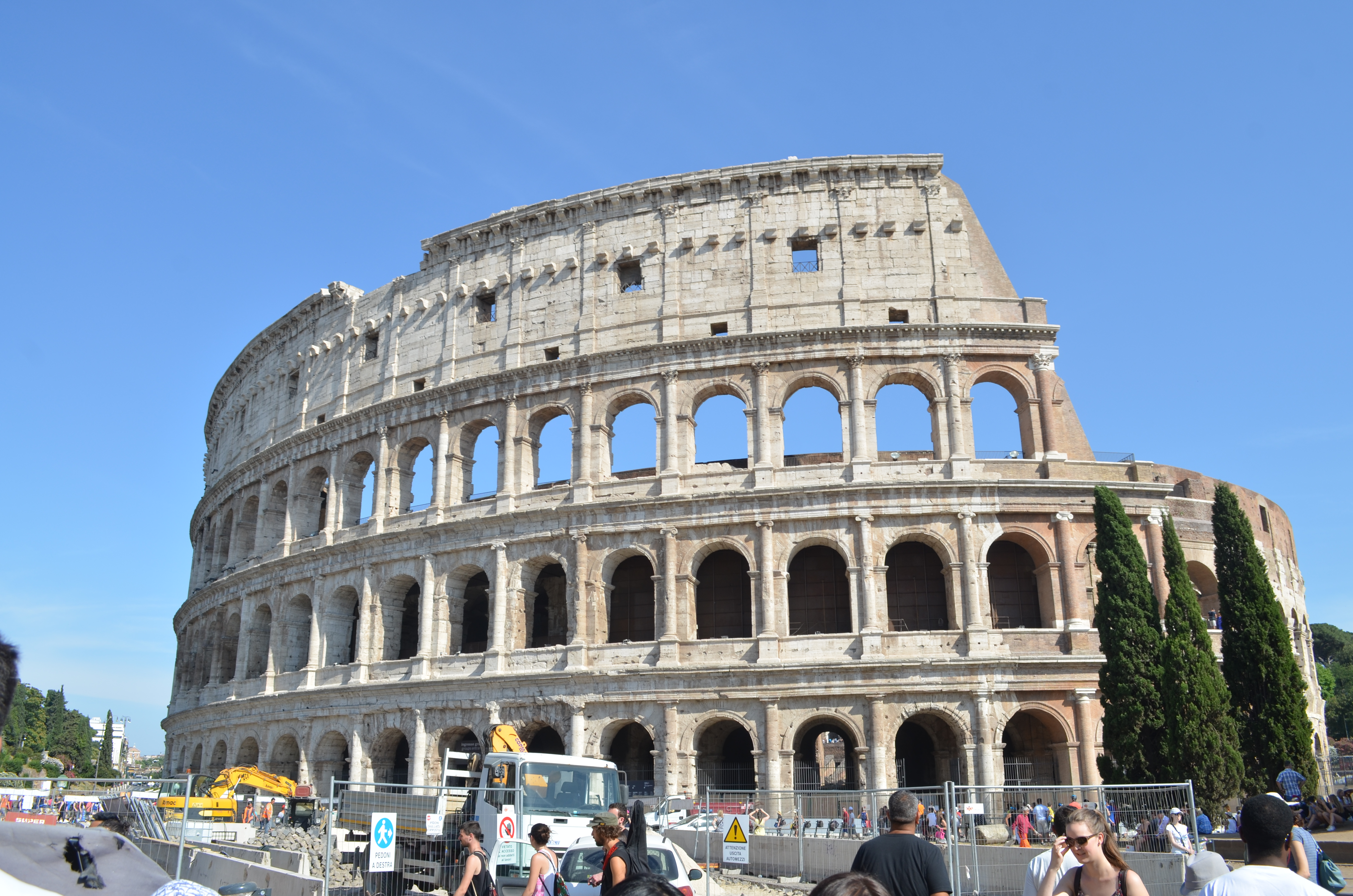 Colosseum